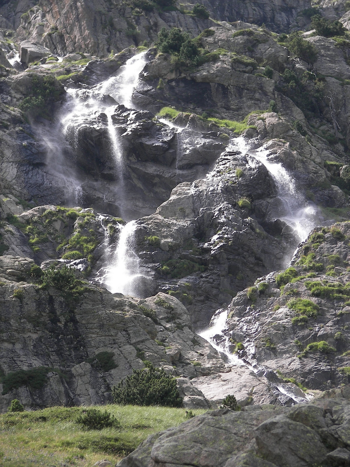 Alto Valle del Cinca This is a photography of a Site of Community Importance in Spain with the ID: ES2410052. Natura2000 entry, EEA entry